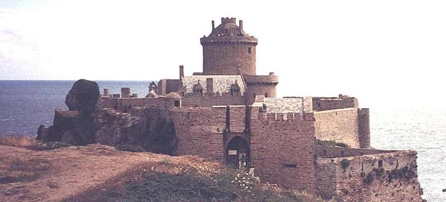 Fort-La-Latte an der Bretagne